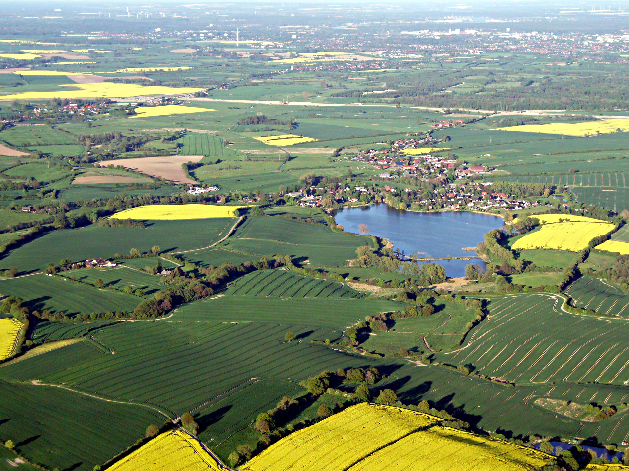 Heilshoop mit Moorteich und Schweineweide aufgenommen am 9.5.2008 aus dem Heißluftballon, Hartmut Schmidt